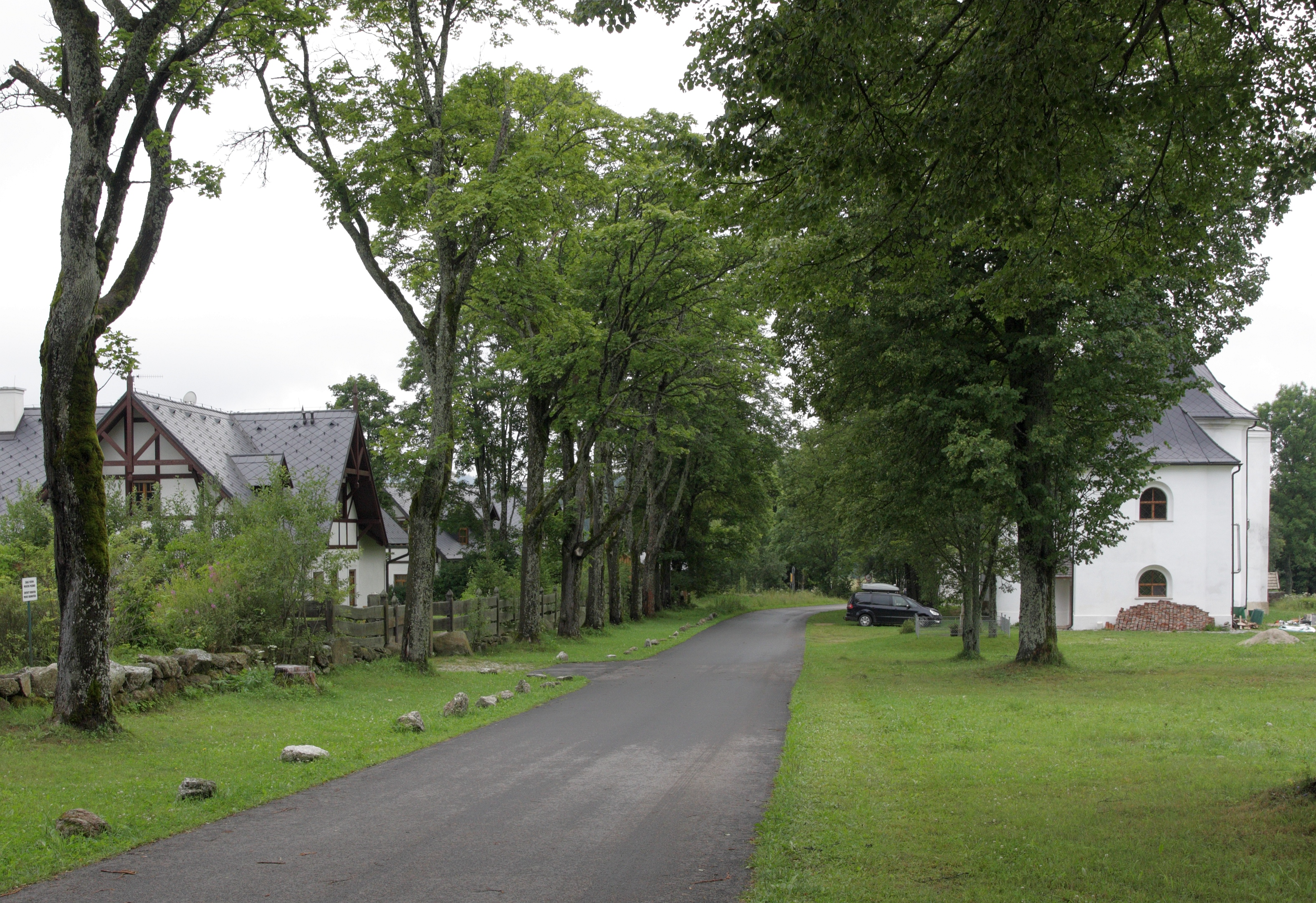 Pohoří na Šumavě - hlavní (jediná) ulice od východu.